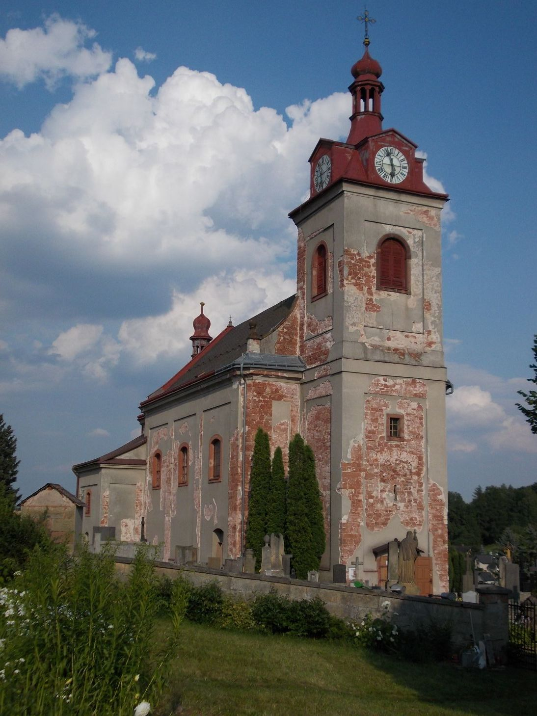 Kostel sv. Václava, Dolní Kalná